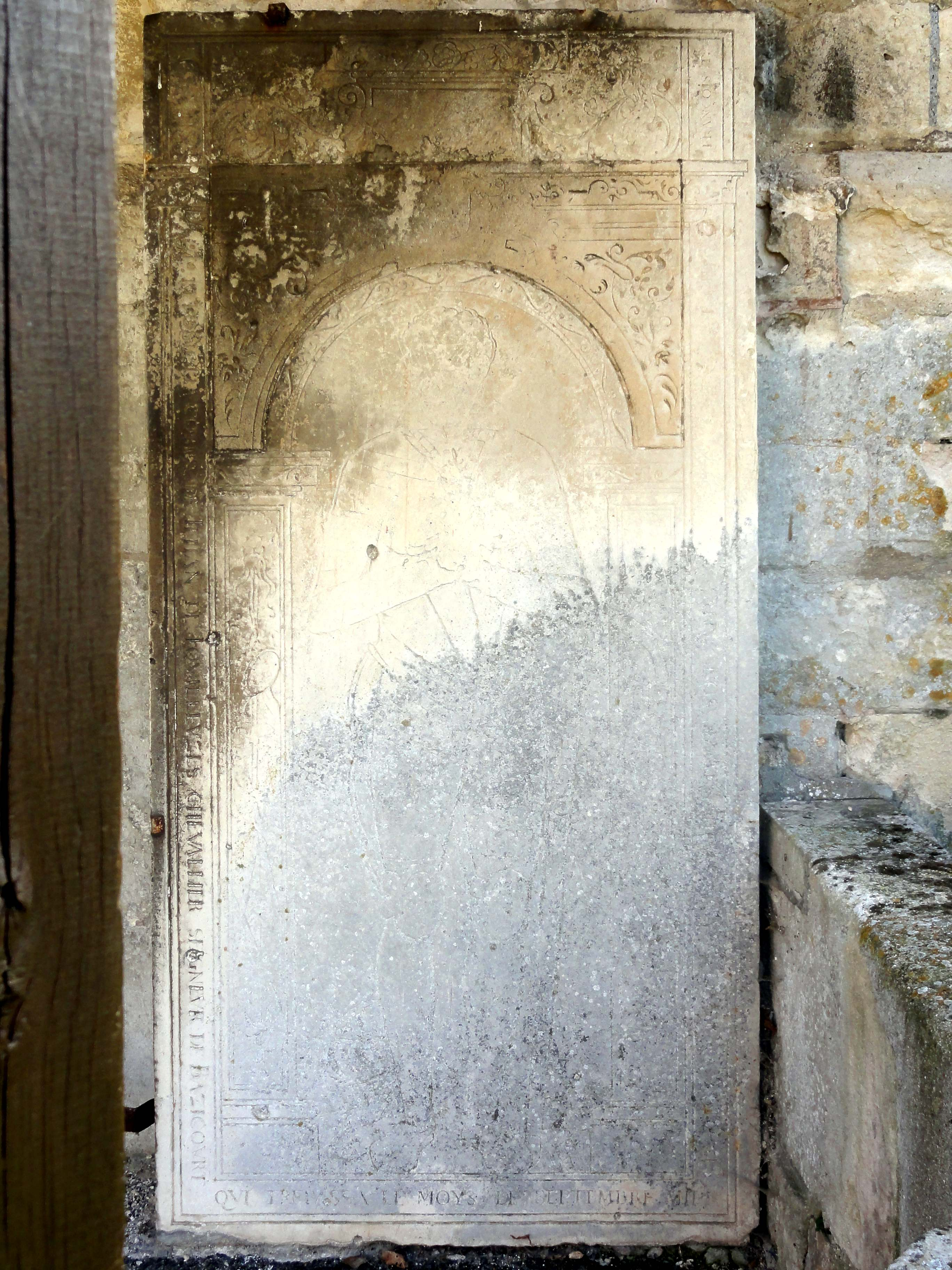 Église Saint-Nicolas de Bazicourt, dalle funéraire à effigie gravée de Jean de Fouilleux.